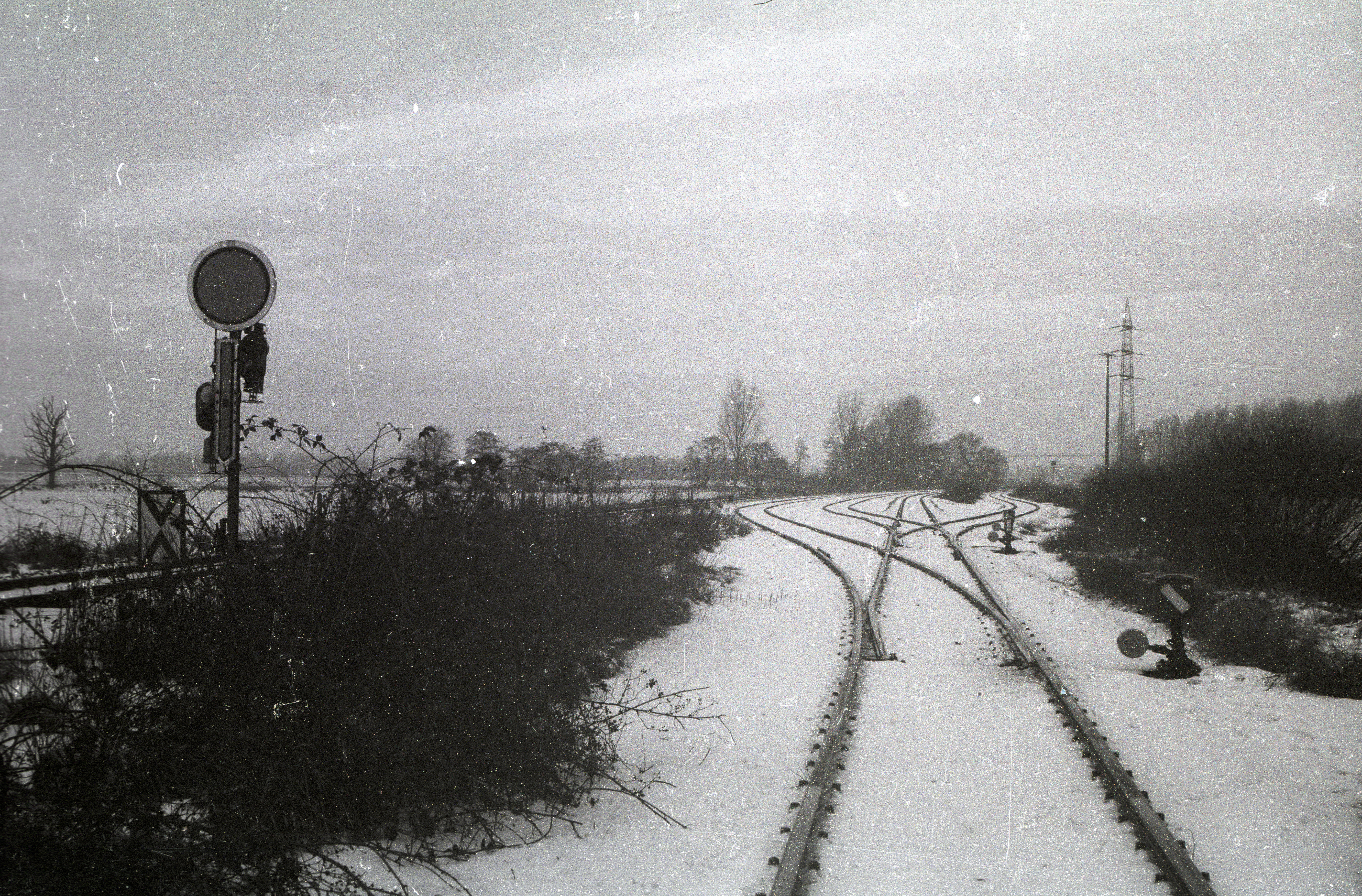 Südliches Ende des Vorbahnhofs Jülich, Blick in Richtung Jülich Bahnhof. Links das Streckengleis Düren - Jülich mit dem Einfahrvorsignal, das in den 1990er Jahren durch ein Lichtsignal an selber Stelle ersetzt wurde. Vom Vorbahnhof ist nach dem großen Bahnhofsrückbau der 1980er Jahre nur das durchgehende Gleis übrig geblieben. Hinter dem Fotografen befindet sich die Brücke der Straße Jülich - Düren sowie die Einfahrt zum Gelände des früheren AW Jülich (seit 1964 Bundeswehr-Instandsetzungswerk).